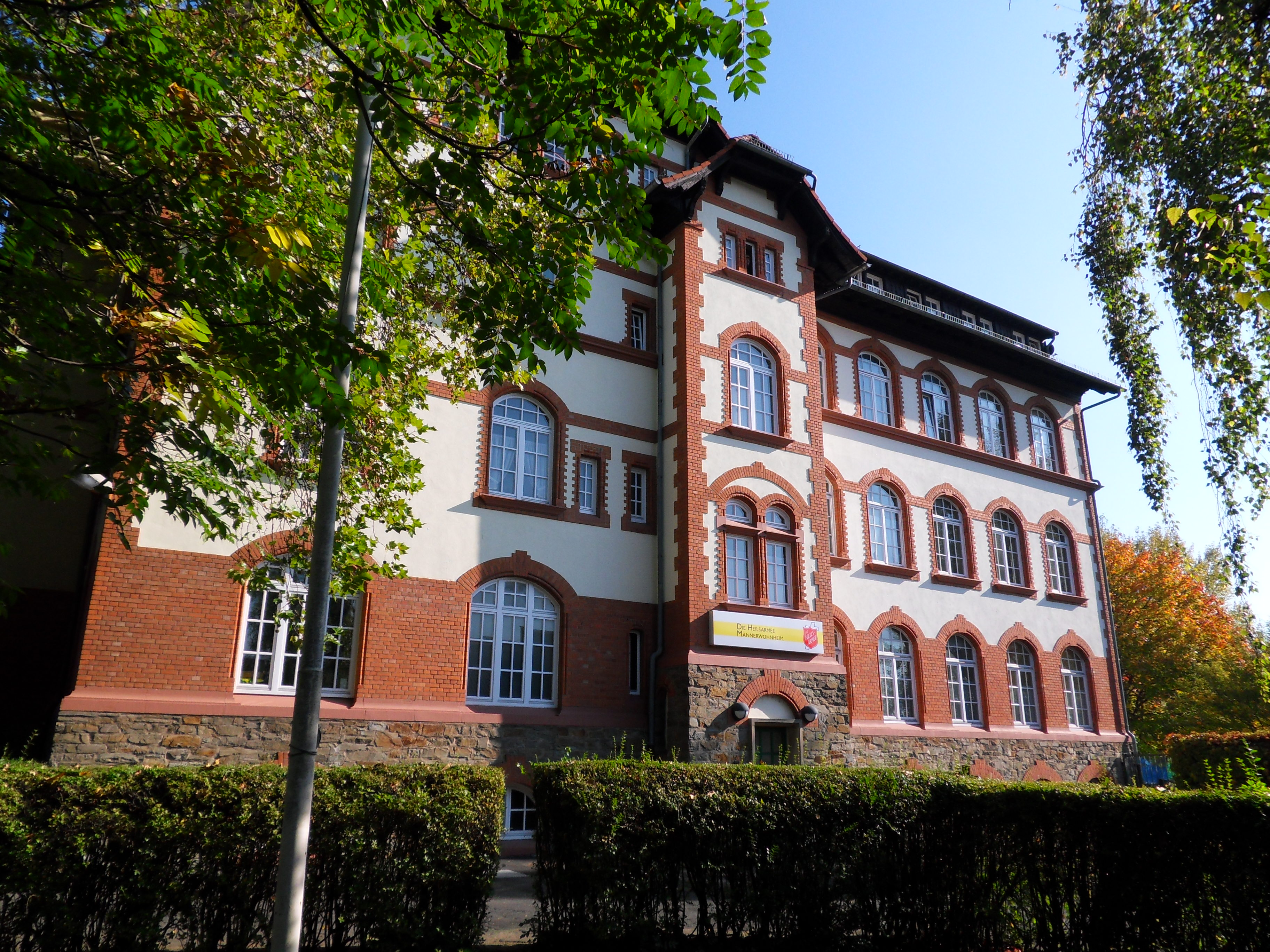 Männerwohnheim der Heilsarmee in der Wiesbadener Schwarzenbergstraße